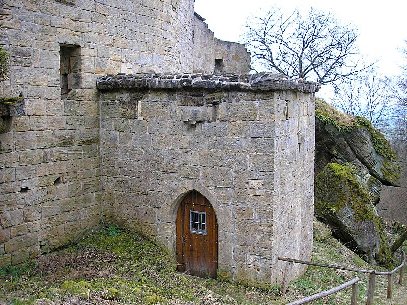 Burg Lichtenstein, Ruine der Nordburg (Gemeinde Pfarrweisach, Landkreis Haßberge, Unterfranken). Das Nordtor. Eigene Aufnahme, Jan. 2007 / Lichtenstein castle (Ruin of the northern castle) near Pfarrweisach (Lower Franconia, Germany). The northern gate. Own photo, Jan. 2007